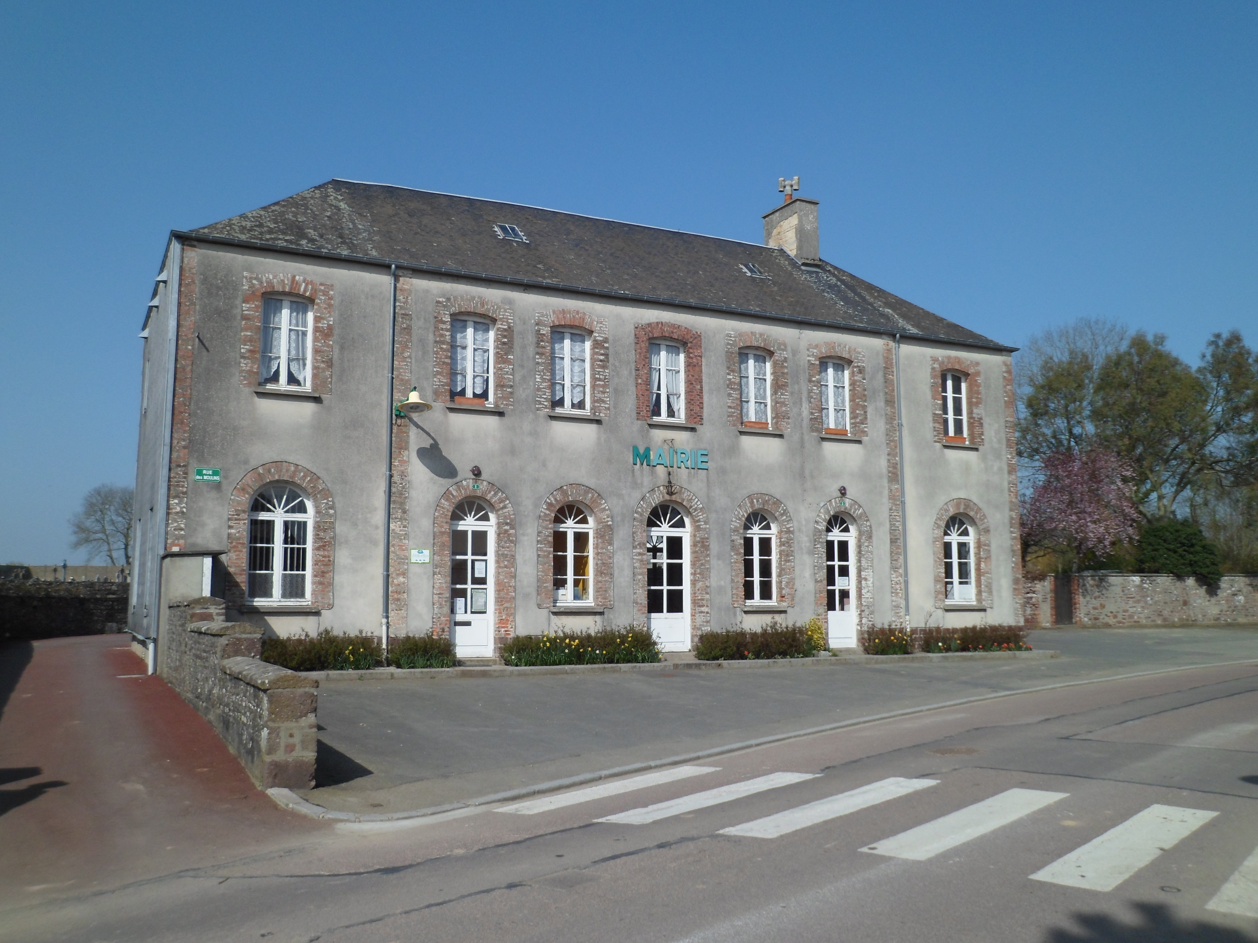 Église Notre-Dame-de-Cenilly